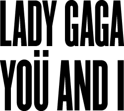 Logo del Sencillo "Yoü and I"